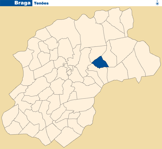 Localização de Tenões no concelho de Braga.